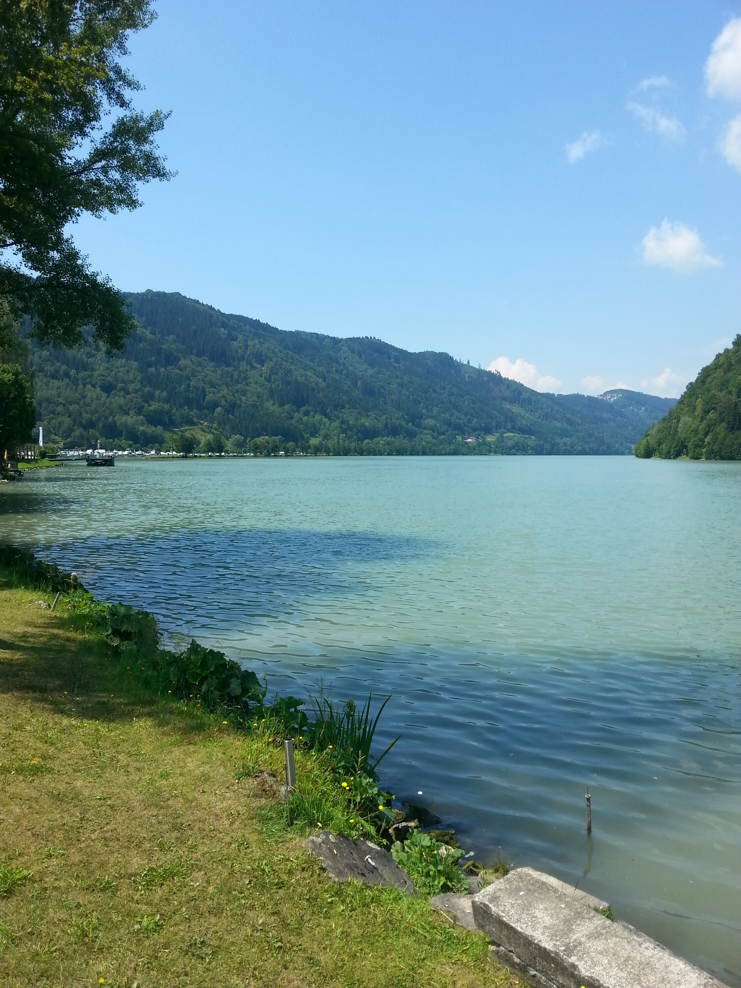 Blick auf die Donauschlinge bei Schlögen, östlich des Areals des römischen Kastells.